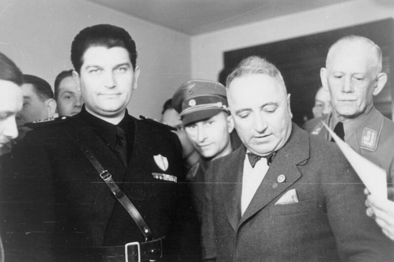 Im Bild rechts Dr. Robert Ley, links der italienische Arbeiterführer Cianetti